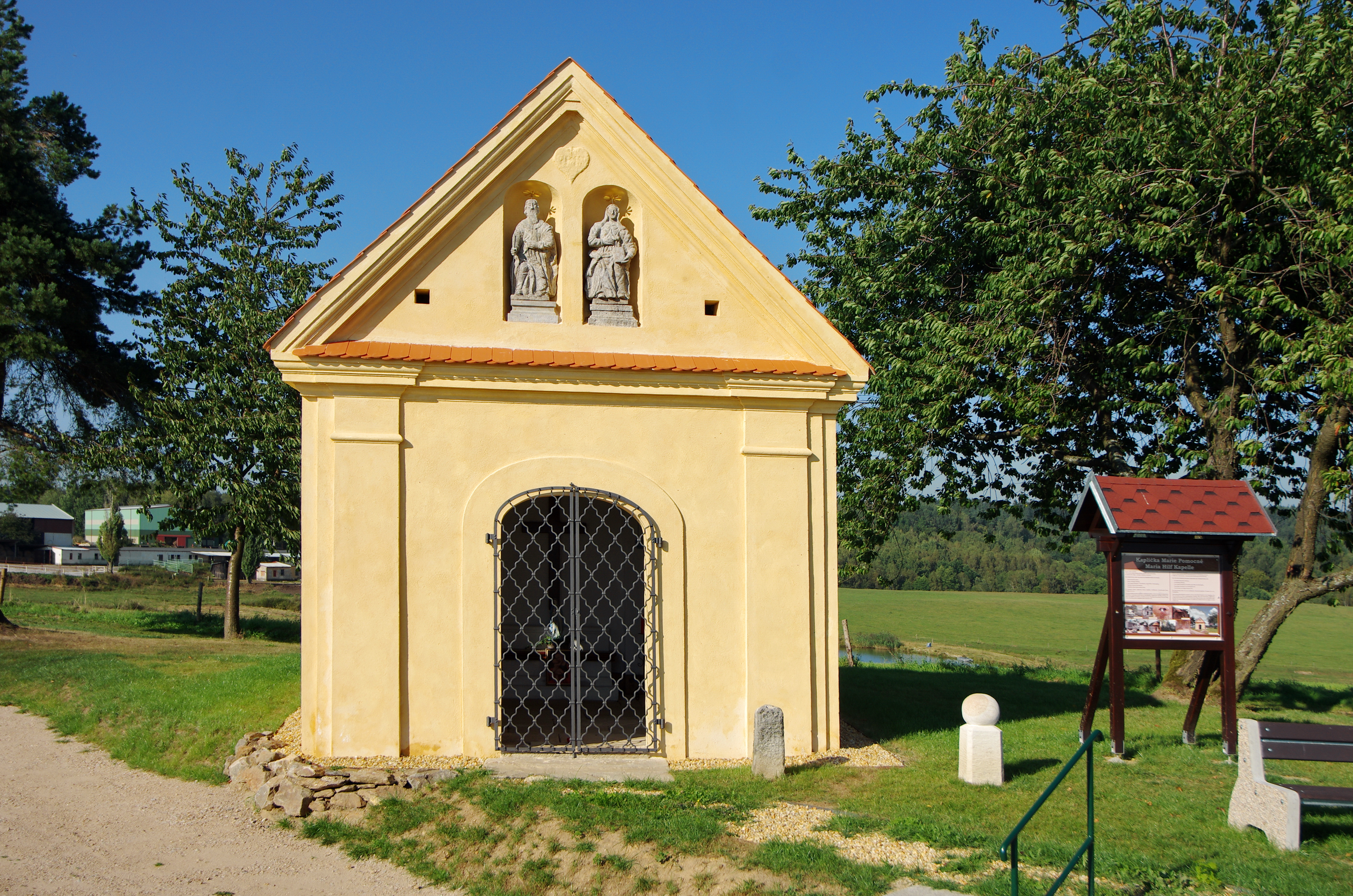 Kaplička, na Chlumku, Libnov.